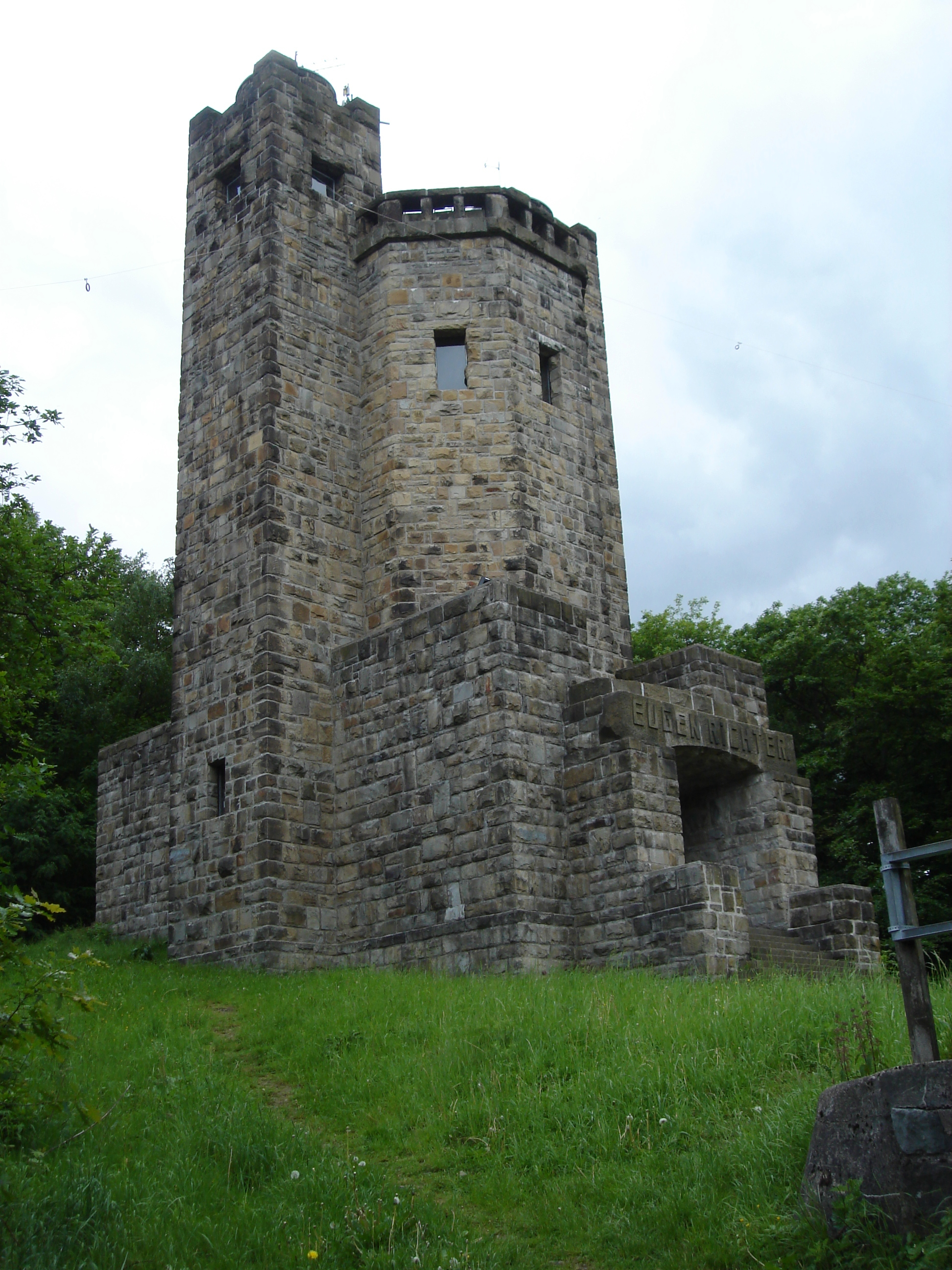 Eugen-Richter-Turm Hagen